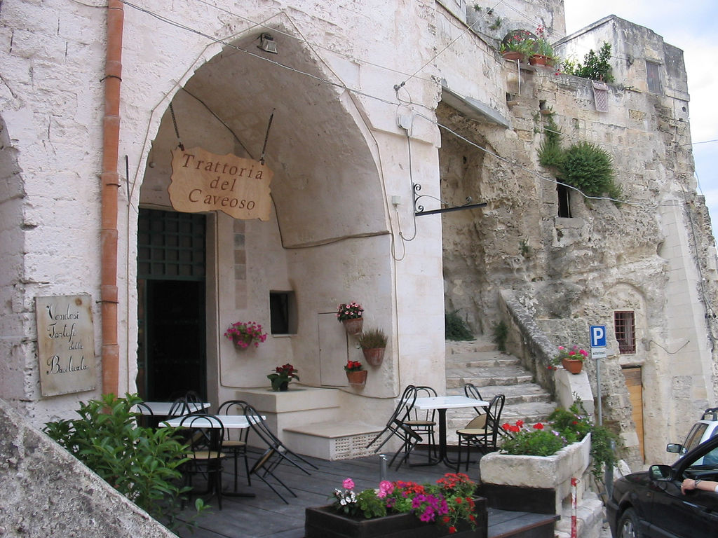 Restaurant in the Sassi di Matera, Basilicata, Italiarestaurant